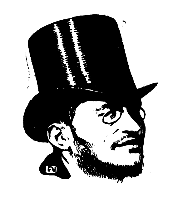 Portrait of French poet Éphraïm Mikhaël (1866-1890) from Le Livre des masques (vol. II, 1898) by Remy de Gourmont (1858-1916)